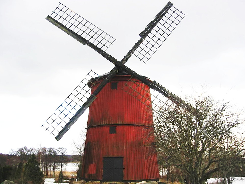 Väsby kvarn, Vallentuna, april 2006. Förstördes vid en anlagd brand 30 mars 2008.